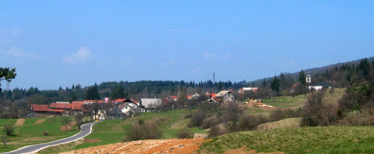 Bezuljak, village in Slovenia (near Cerknica town). photo:Ziga 19:50, 7 April 2007 (UTC)